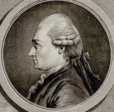 Jean-Michel Moreau le Jeune (1741–1814): Der Komponist André-Ernest-Modeste Grétry (1741–1813). Gravierung, 1772. British Library. Ausschnitt.